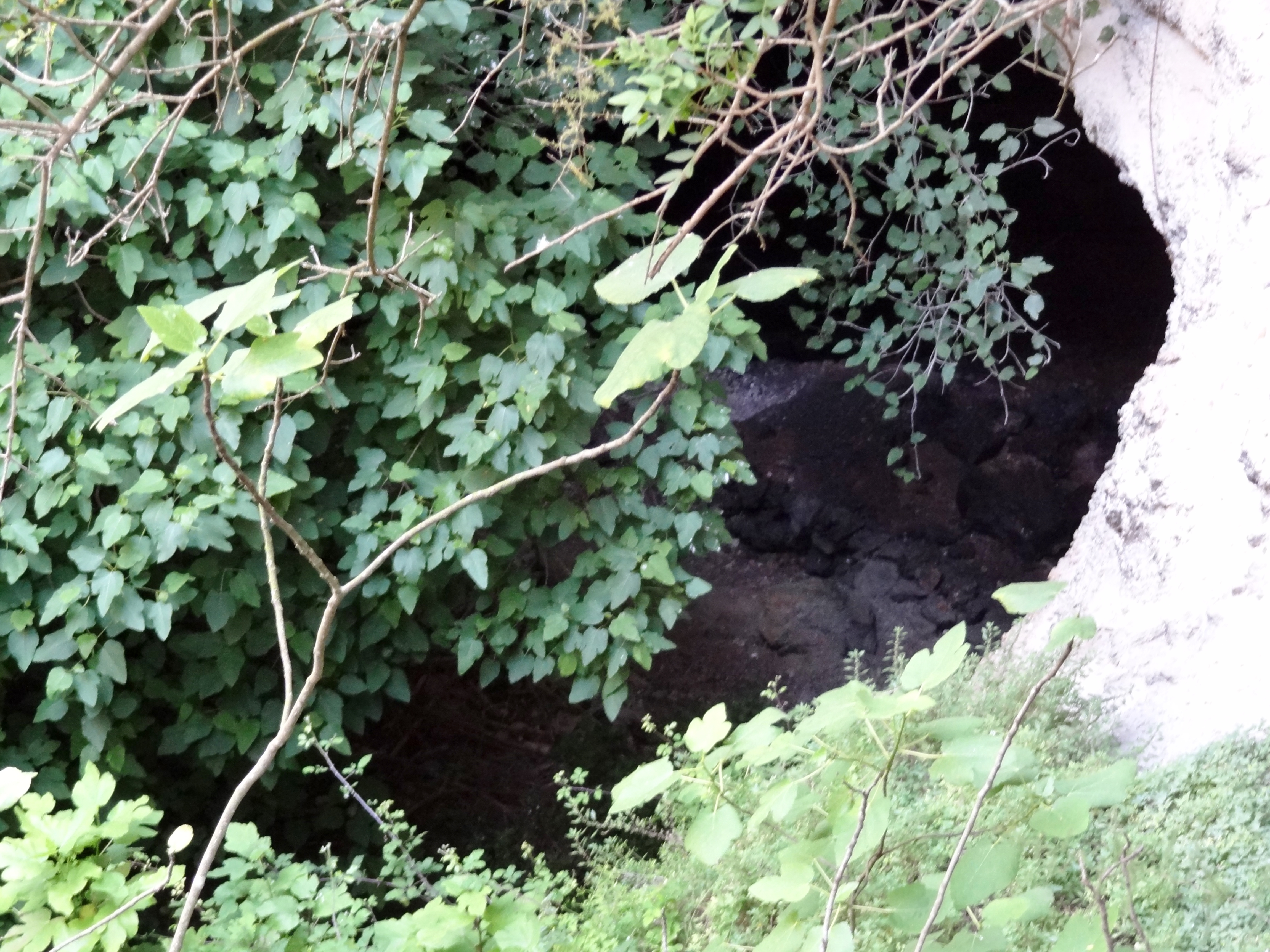 Eingang zur Cova de sa Gleda, Gemeinde Manacor, Mallorca, Spanien